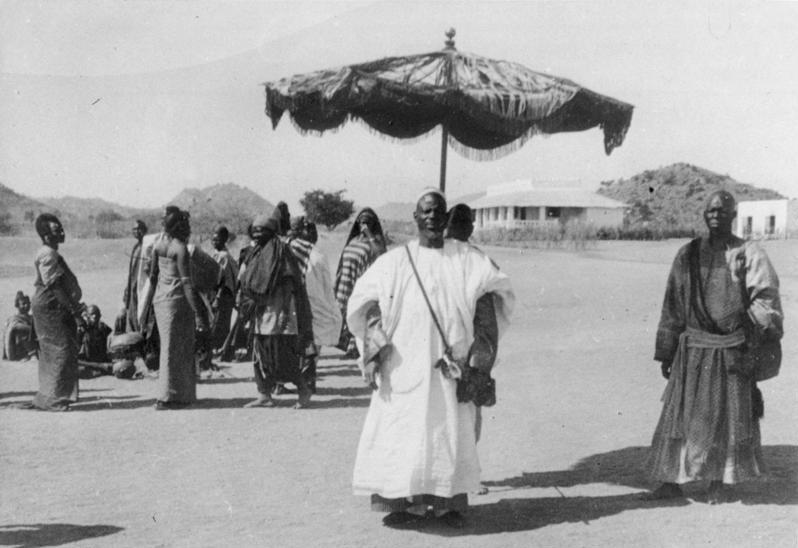 Kamerun. Mandara-Berge. Sultan Bukar.